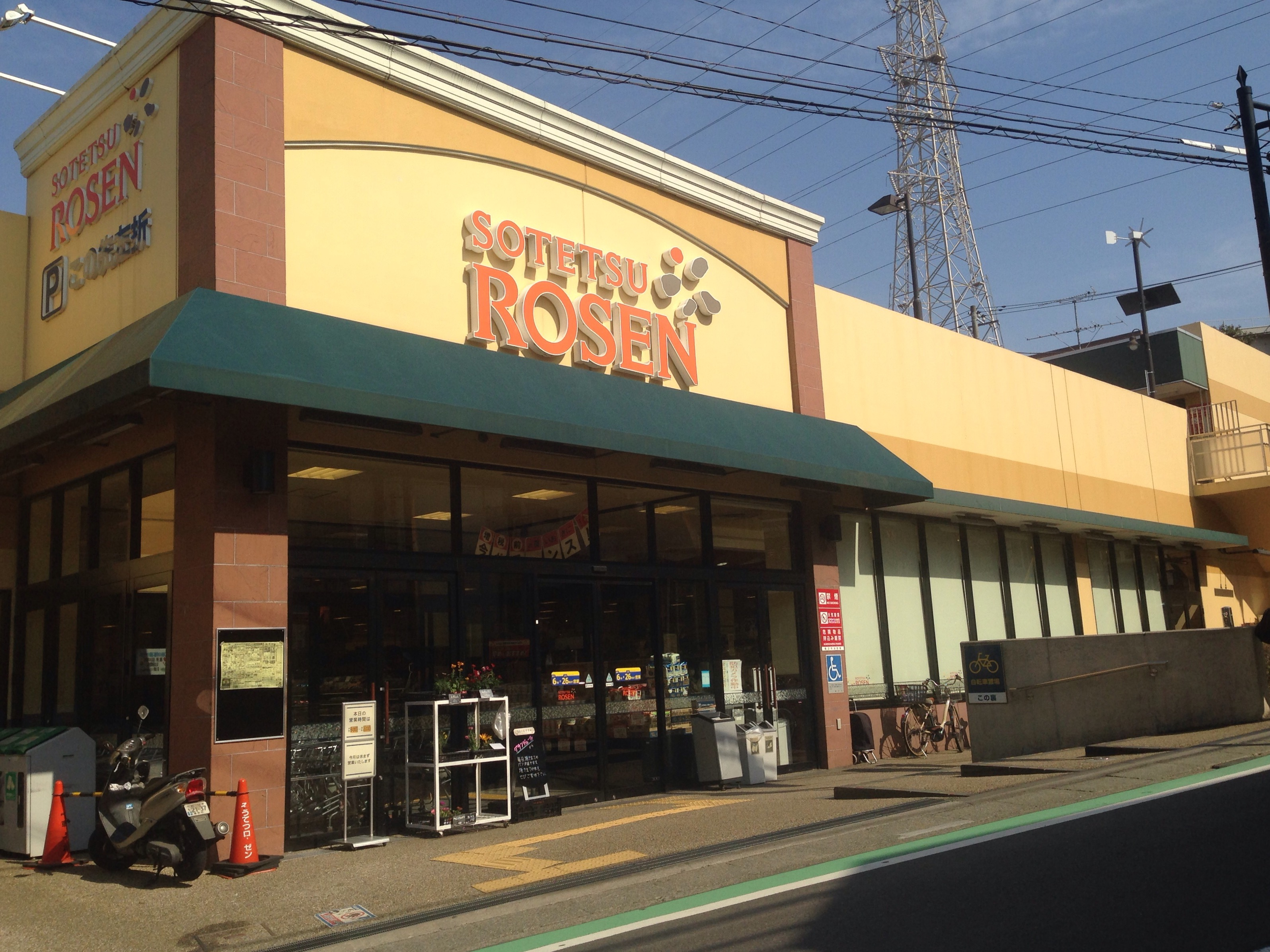 そうてつローゼン希望が丘店（最寄り駅：相鉄線希望ヶ丘駅）。